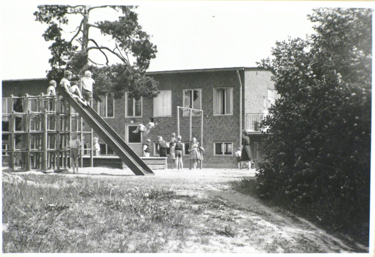 Nybodahemmet med lekplats och barn 1942.